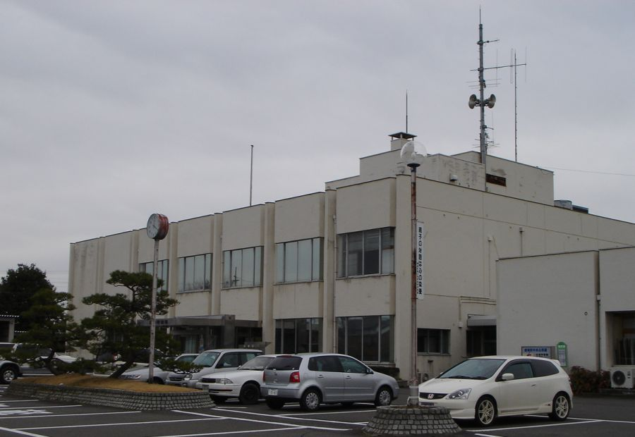 柳津町役場.jpg(岐阜県羽島郡) 2006年1月、岐阜市との合併で廃止、「柳津地域振興事務所」となる 撮影：投稿者(Monami)、撮影日：2005年2月